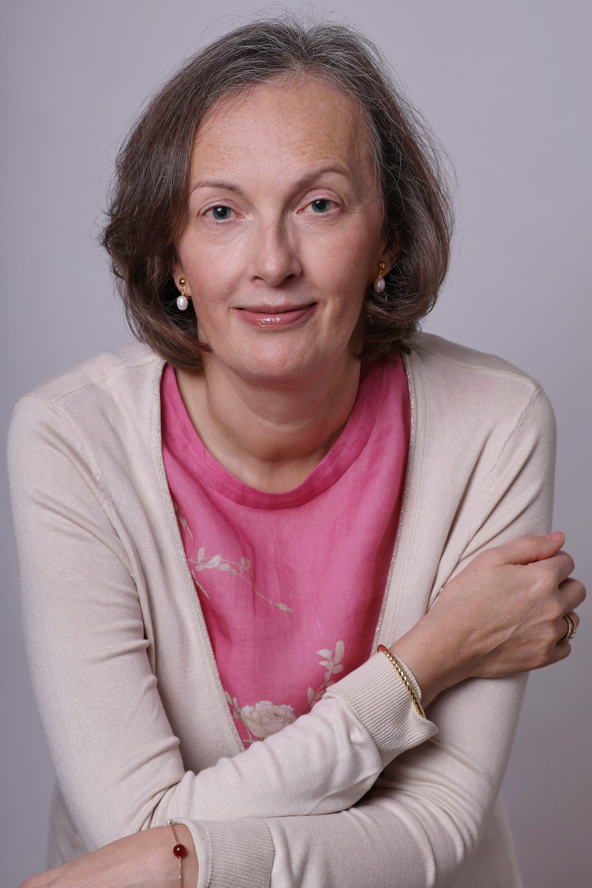 Portrait - Ecrivain